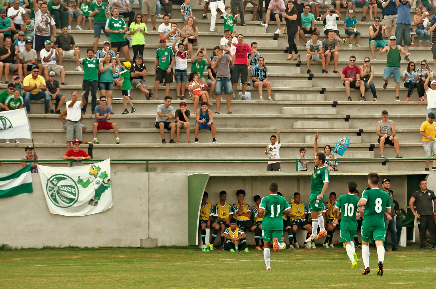 Gol do meia Jhonny durante a inauguração do novo Estádio Wolmar Salton do Sport Clube Gaúcho de Passo Fundo-RS em 2016 contra o Grêmio Sub-20